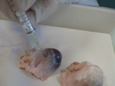 Decription : Prélèvement de l'humeur vitrée contenue dans un œil de bœuf. Auteur : V. M. V. M.